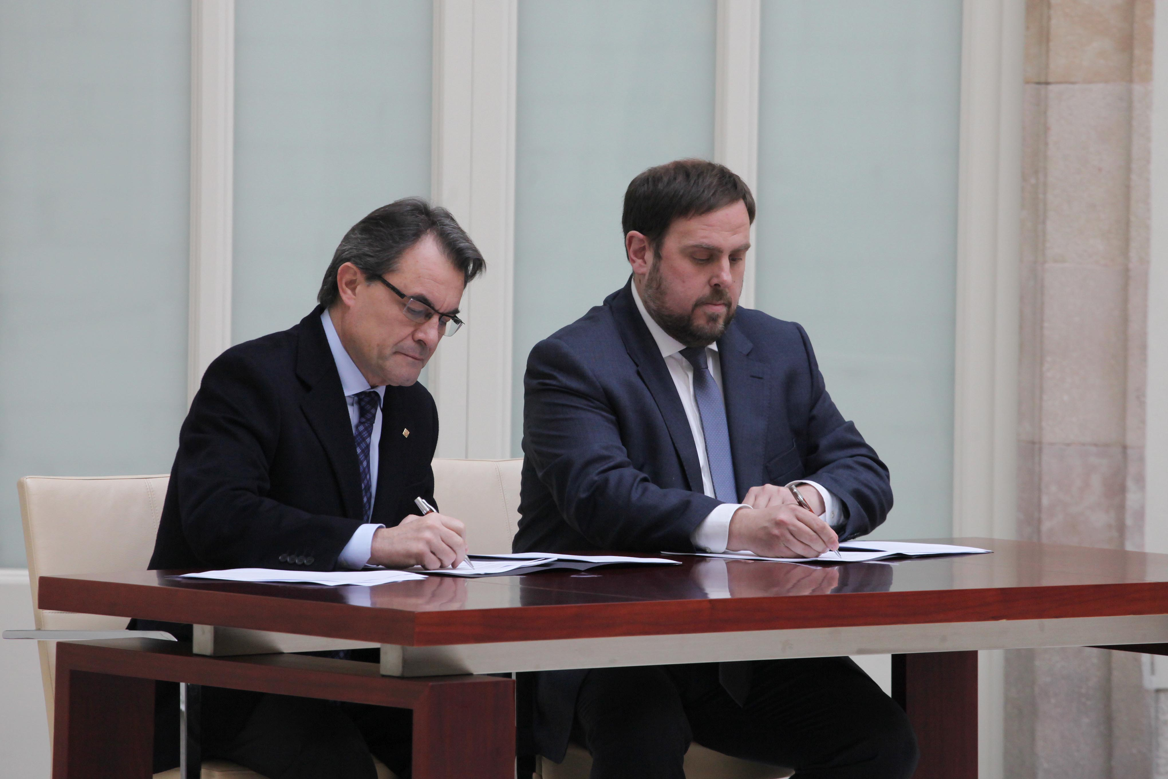 Mas i Junqueras.